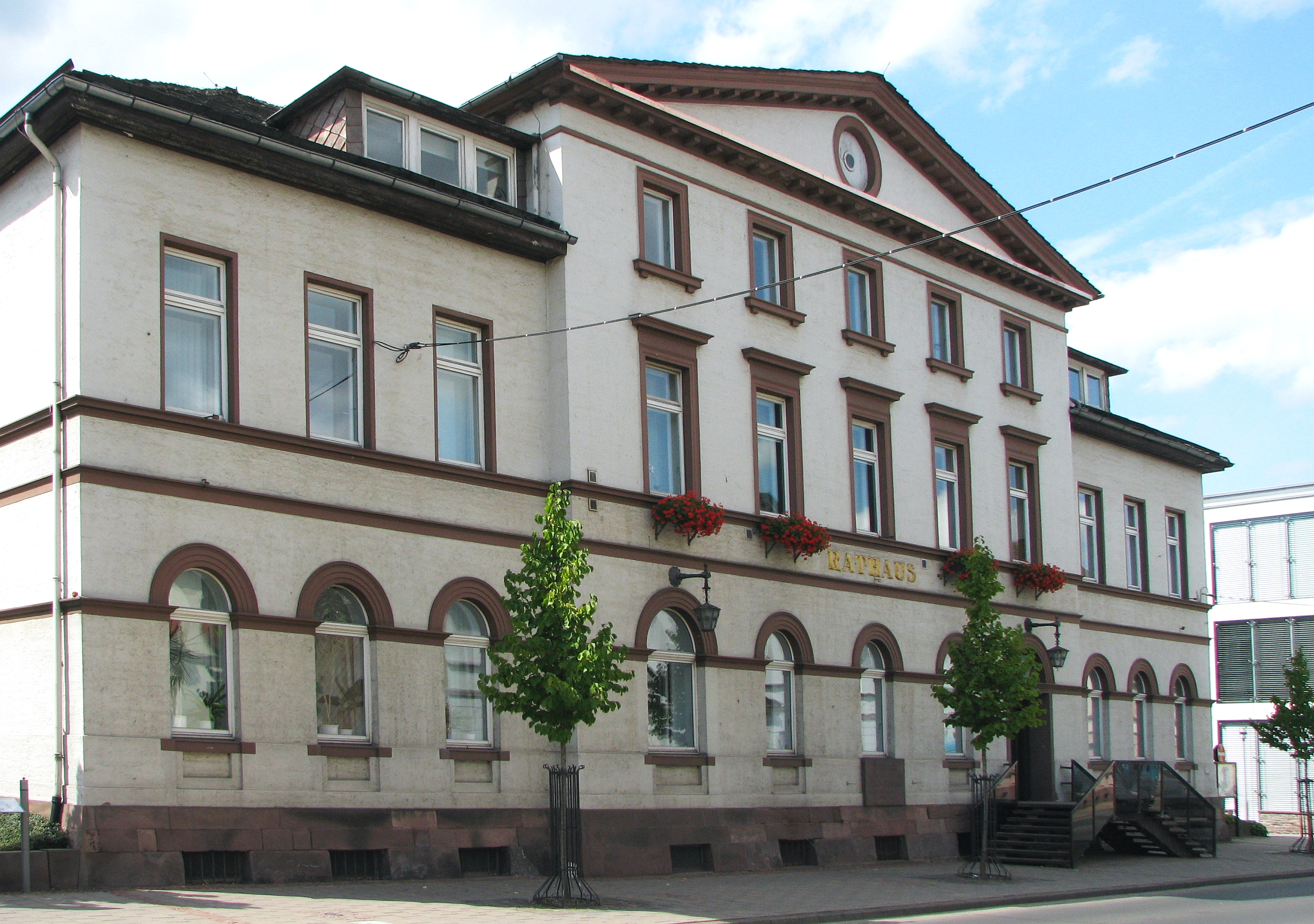 Rathaus der Stadt Holzminden, umgewidmet ab 1876 zum Rathaus, erbaut 1844 als Bürgerschule. Niedersachsen Foto Wolfgang Pehlemann IMG_0976